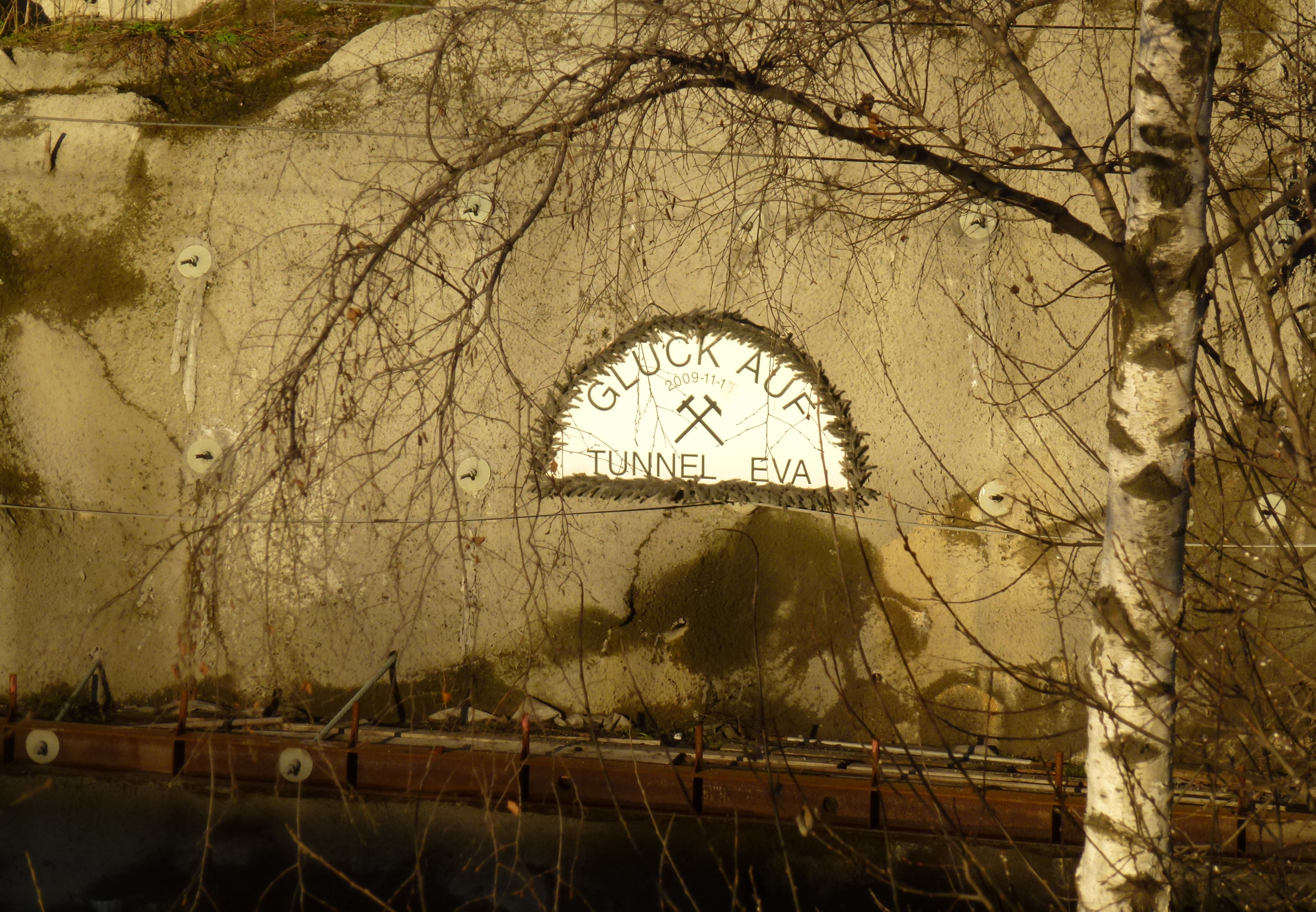 Vasatunneln arbetstunnel "Glück auf"